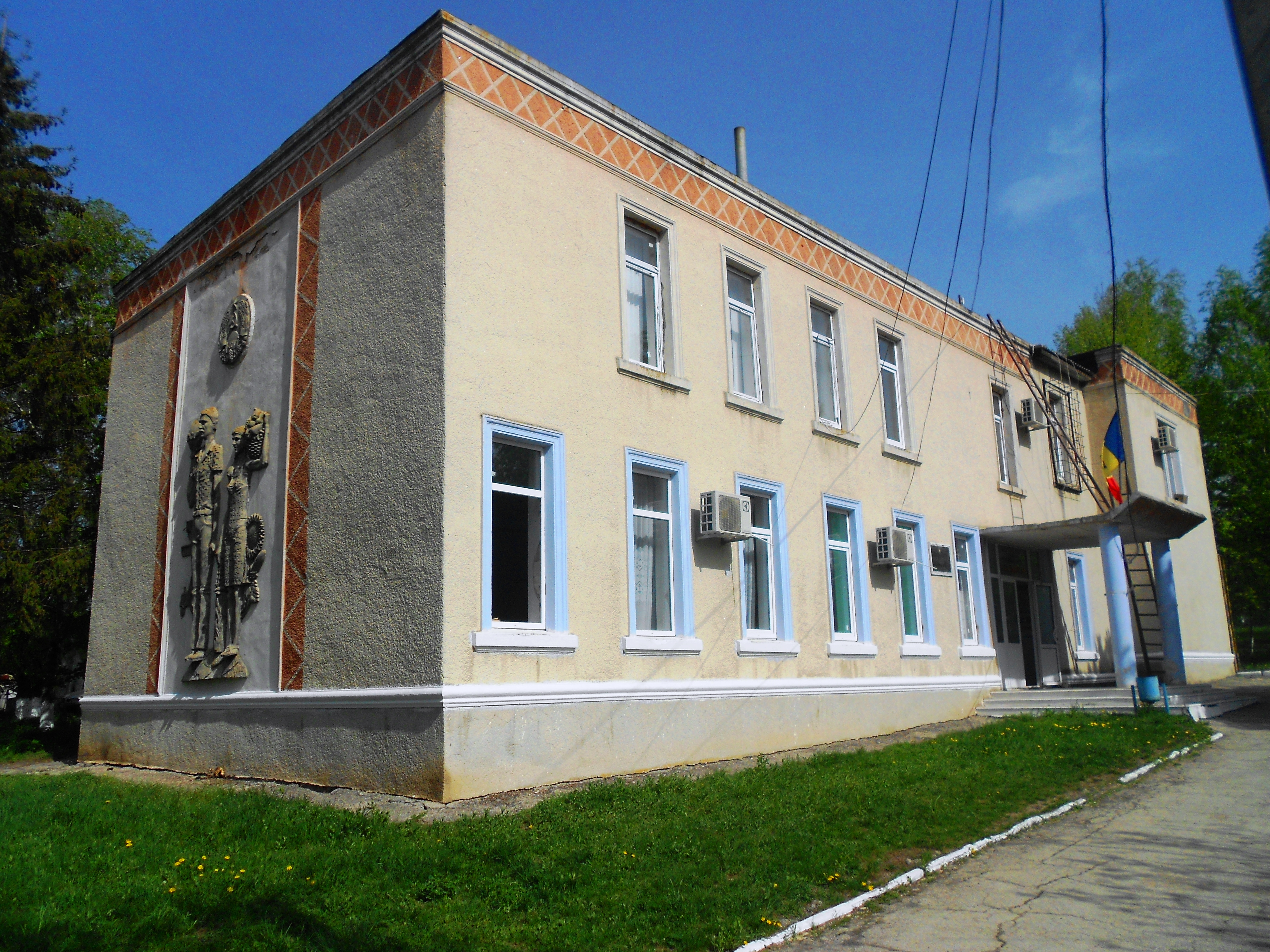 Primăria Târnova, r. Dondușeni